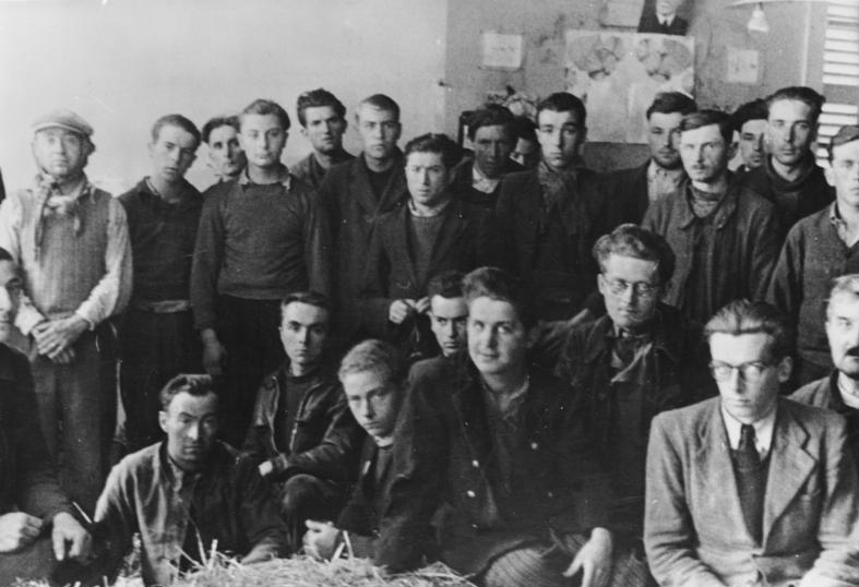 Der rote Maquis in Frankreich Ein Sammelsurium von Gefangenen. Es sind Franzosen, Rotspanier, Polen und Italiener, die sich als Terroristen betätigen. Foto: Kriegsberichter Koll